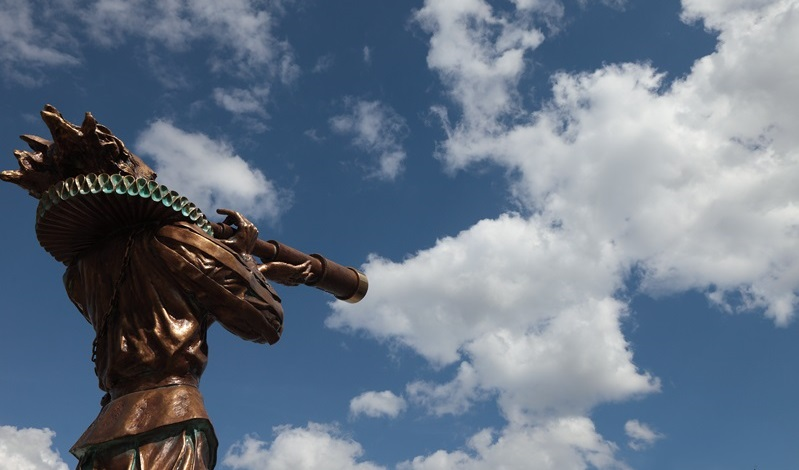 Rzeźba " Wizjoner" autorstwa Arkadiusza Latosa